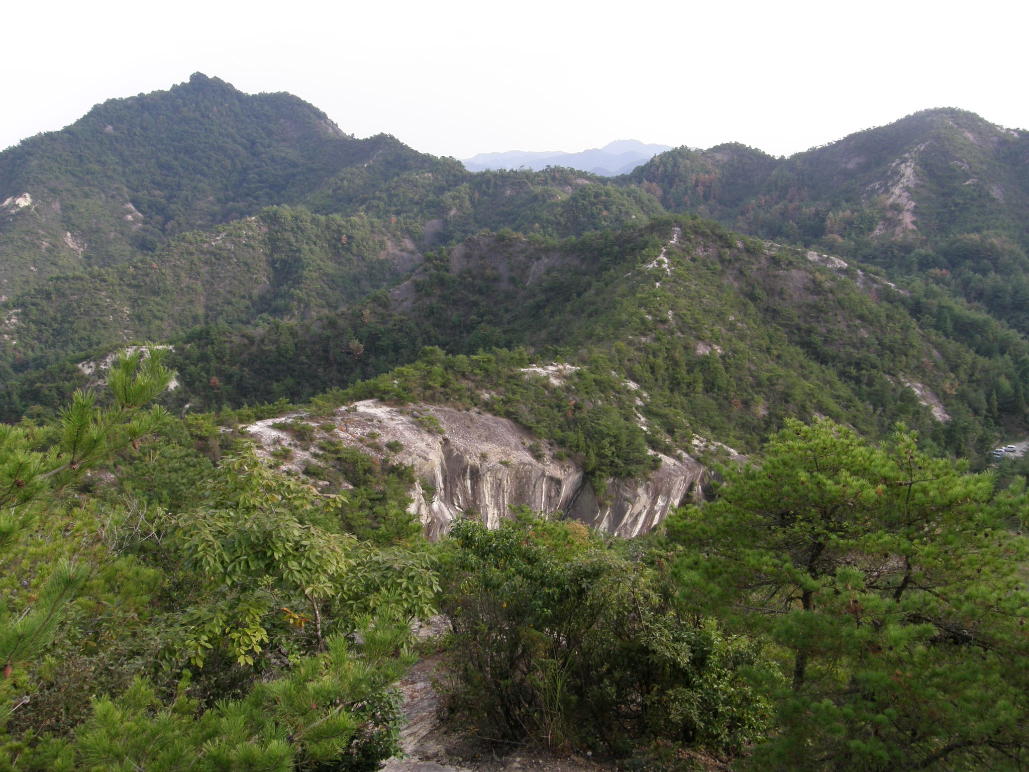 Mt,Zenbo Kasai-Furubokke-nature park 善防山 古法華自然公園 加西市